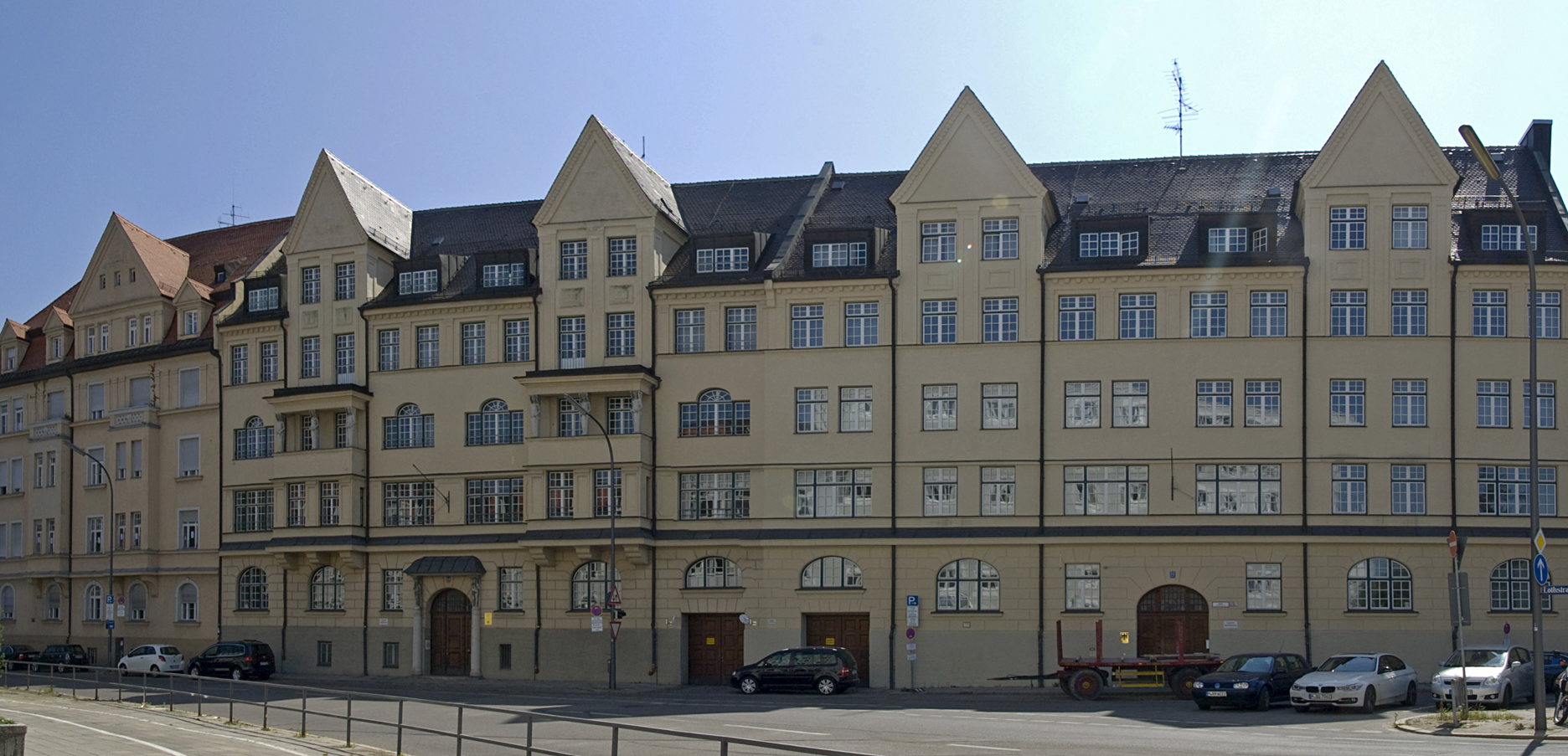 Winzererstraße 52-54, Verwaltungsgebäude, breit gelagerter, viergeschossiger Satteldachbau über hohem Sockel, mit vier Zwerchhäusern mit Satteldach, zwei Kastenerkern mit Karyatidenloggien, Figurenportal, rustiziertem Erdgeschoss und Gesimsbändern, in historisierenden Formen, von Friedrich Spindler, 1912.